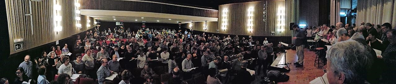 El Messies Participatiu, un format del famós oratori de Händel en què participen cantaires aficionats, implica la formació d'aquests a càrrec de preparadors professionals.